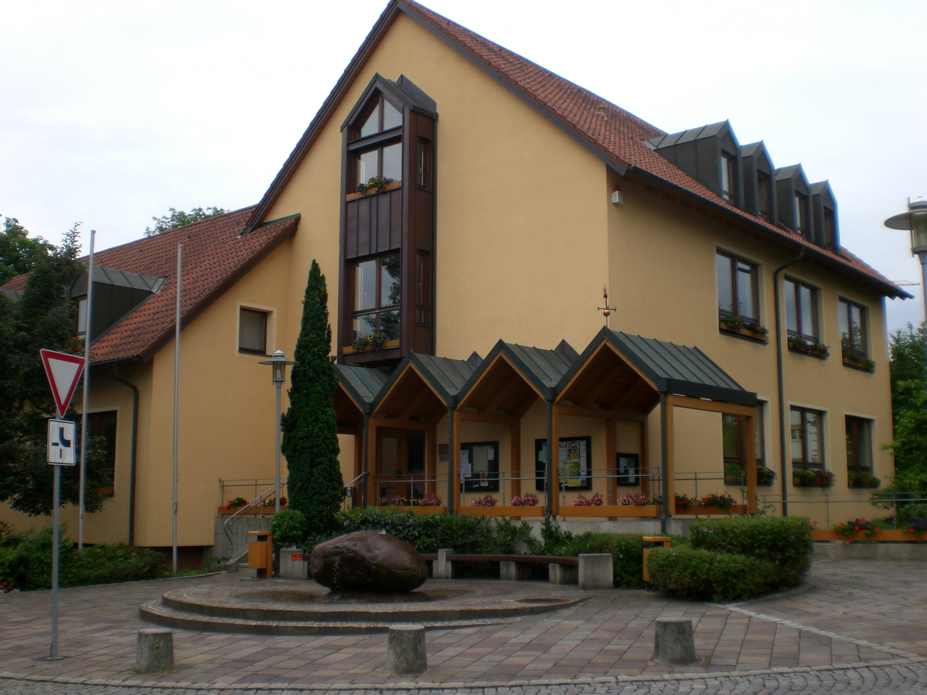 Burgthann, Rathaus